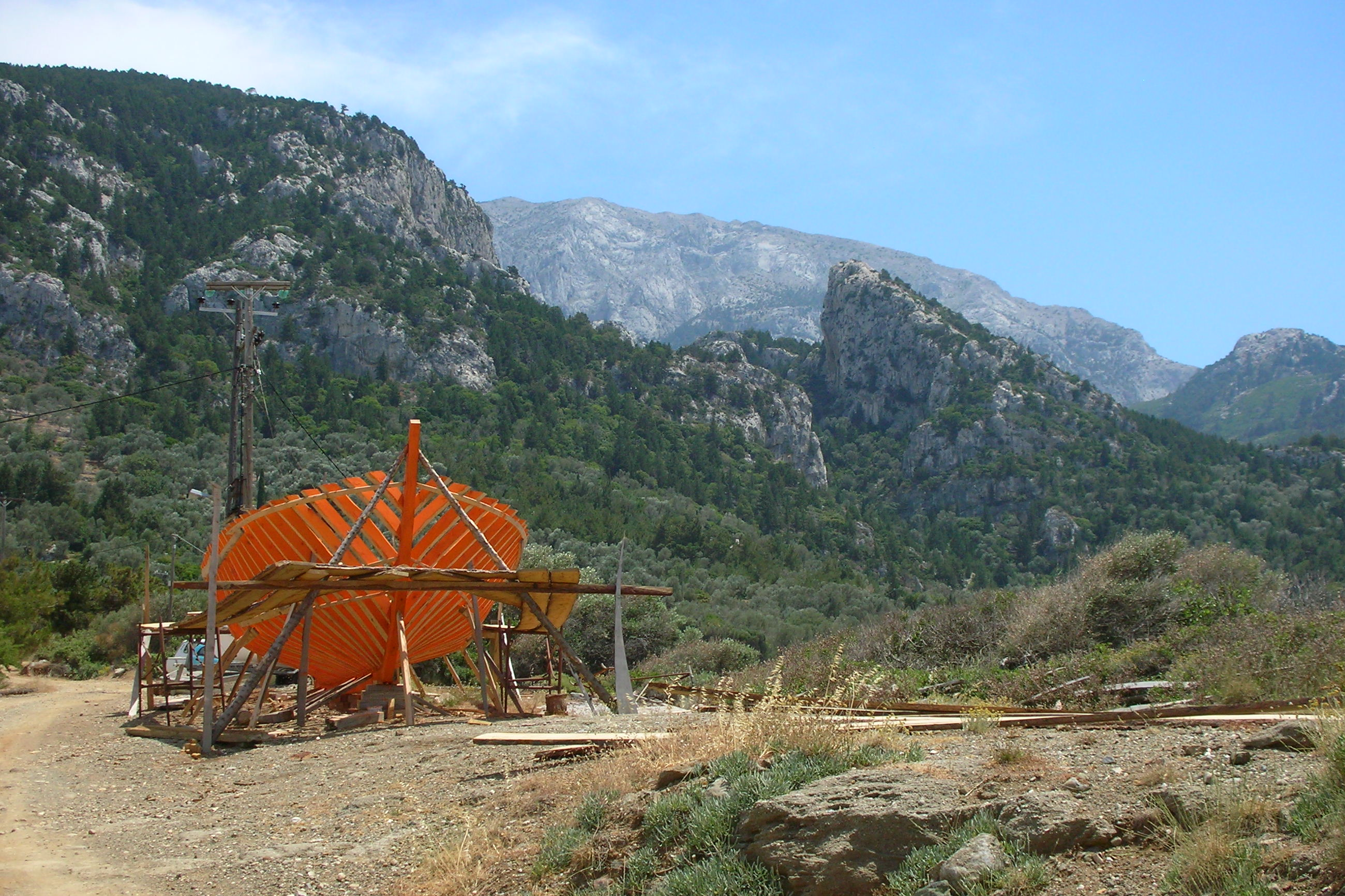 Samos, Agios Isidoros, Kaikiawerft